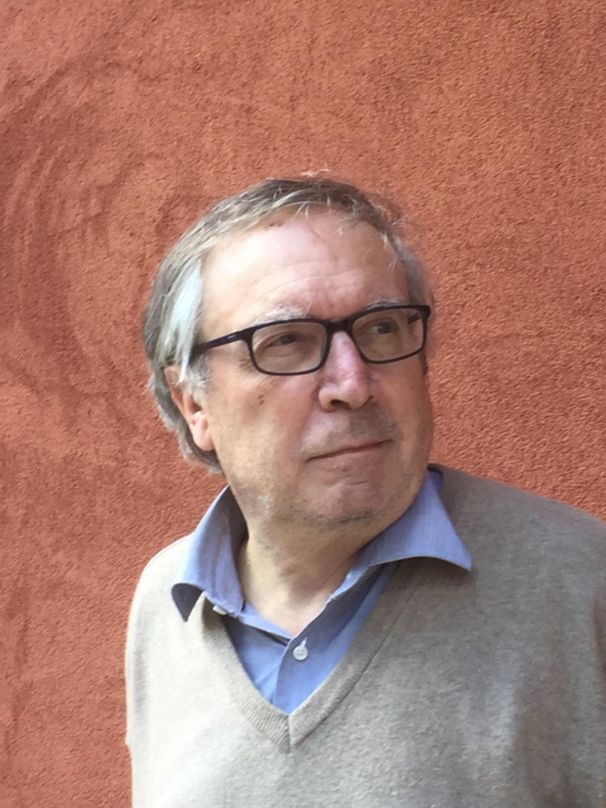 Sergio Arecco